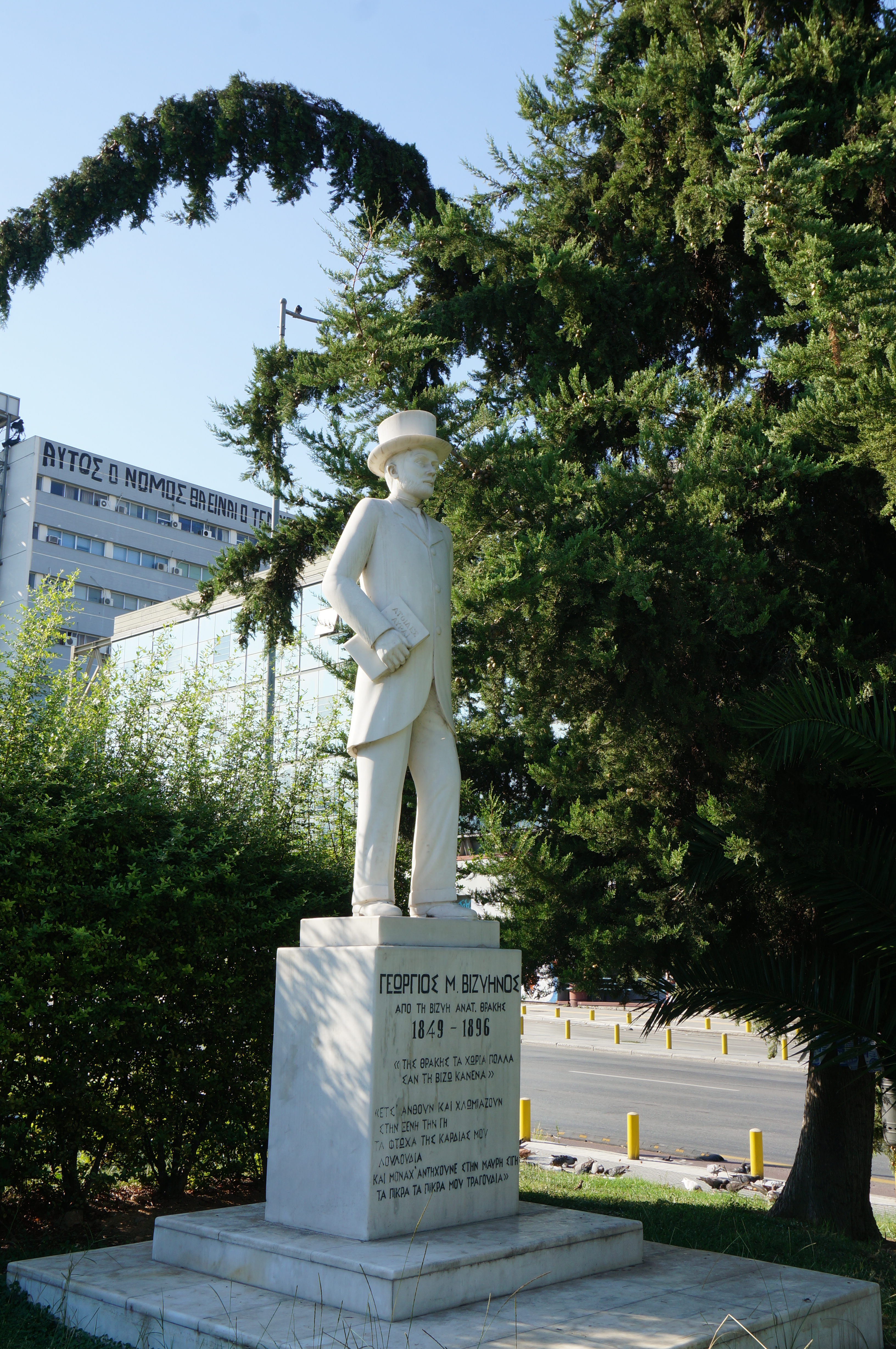 statue d'une perosnalité à Salonique.